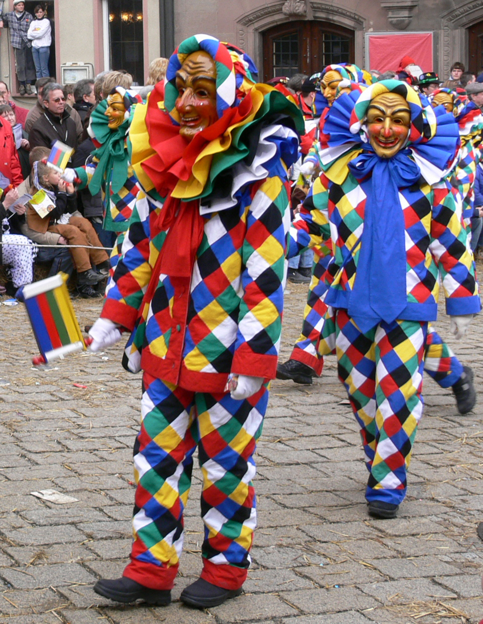 Narrenzunft Tettnang, Figur: Gätterlet Veranstaltung: Narrensprung beim Narrentreffen Meßkirch 2006